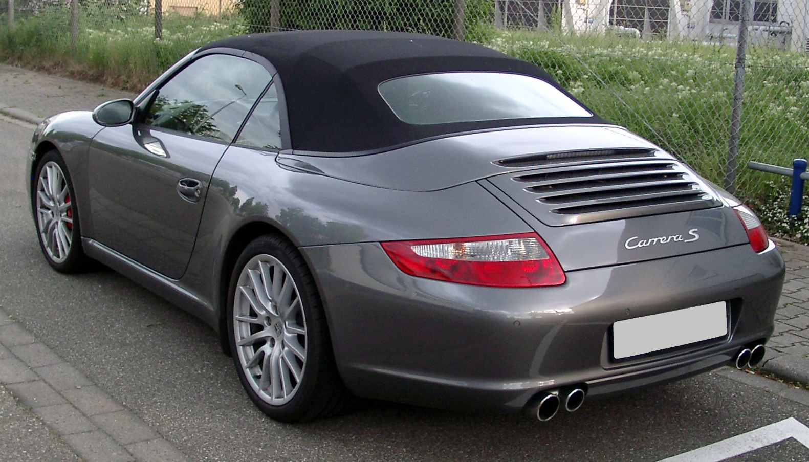 Porsche Carrera S